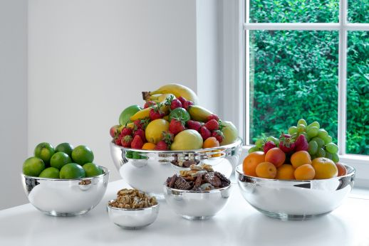 Silberglas-Schalen